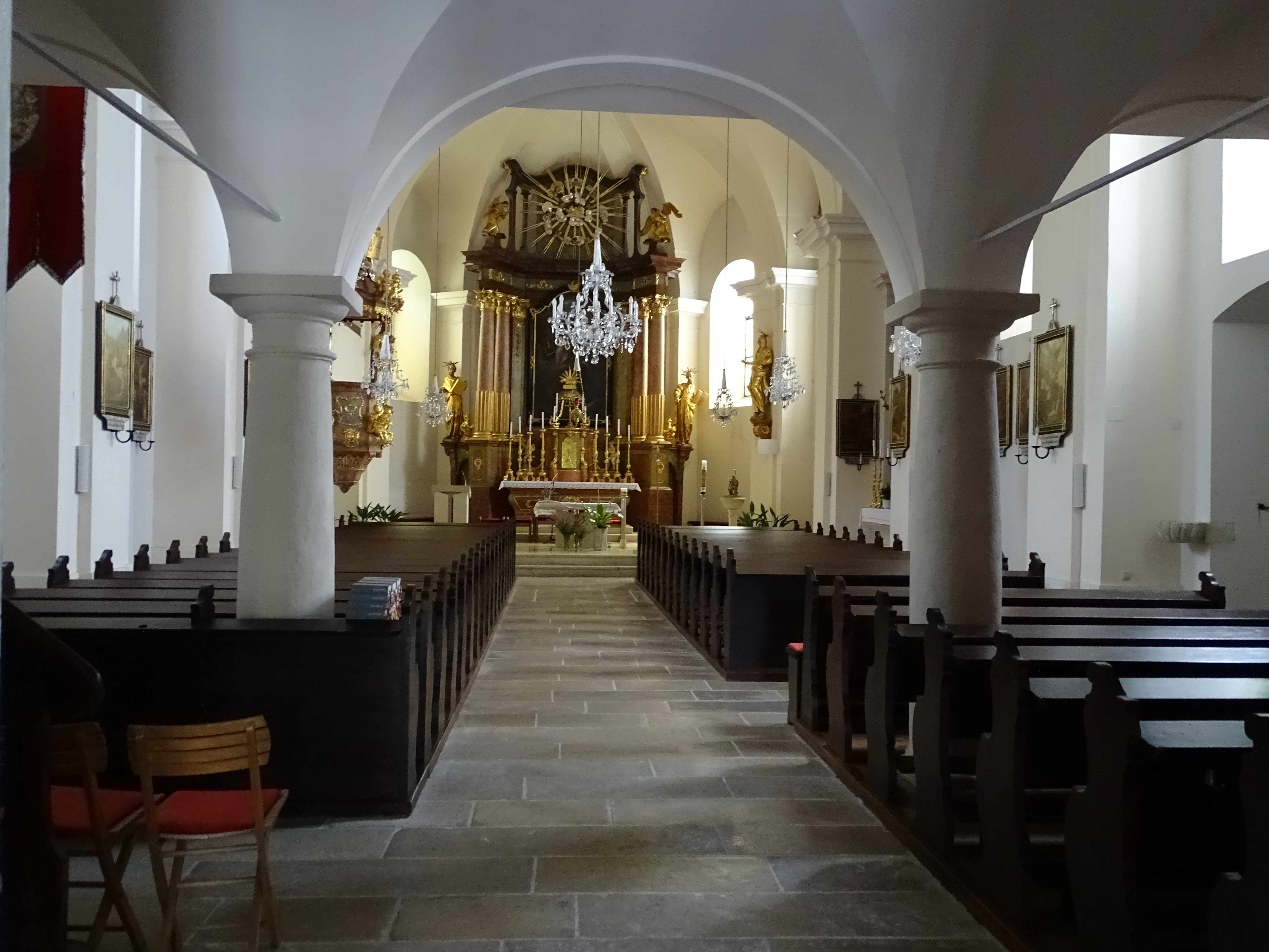 Blick in den Innenraum der Pfarrkirche von Donnerskirchen im Burgenland